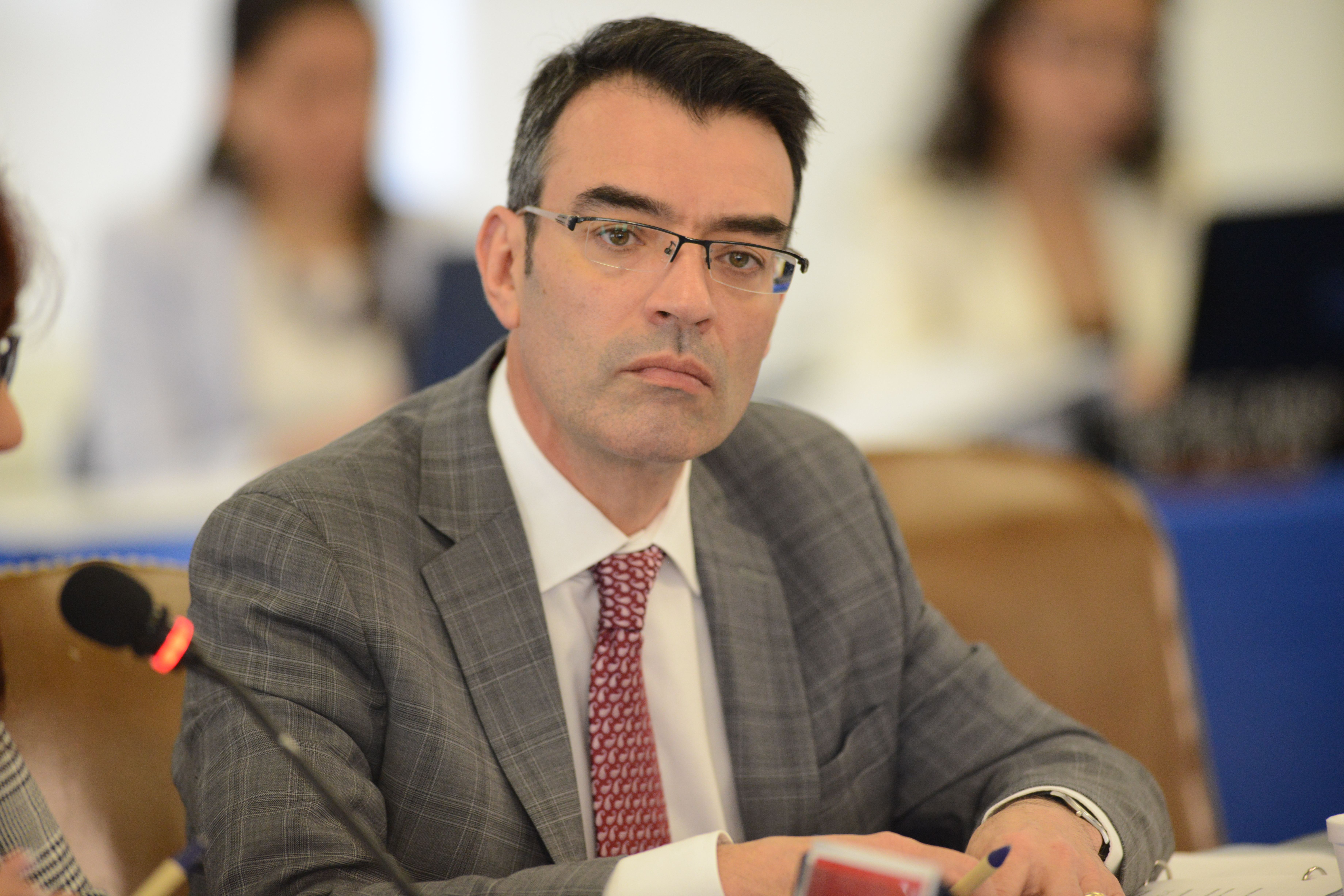 150 Periodo de Sesiones de la CIDH 24 de marzo de 2014 Comisionado de la CIDH James Cavallaro Crédito de la foto: Daniel Cima